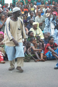 Démonstration de la danse Soli Fête Annuelle de la danse soli à Kindia, Guinée